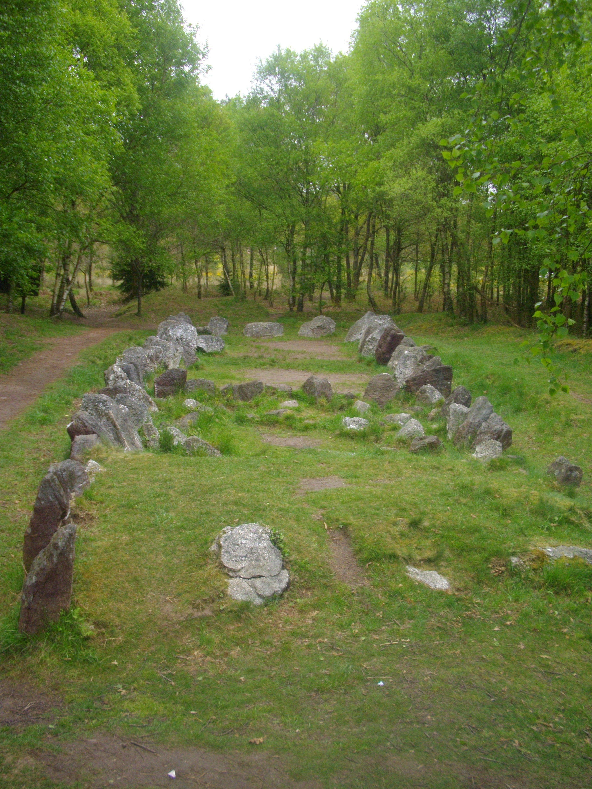 Site mégalithique dit Jardin aux Moines